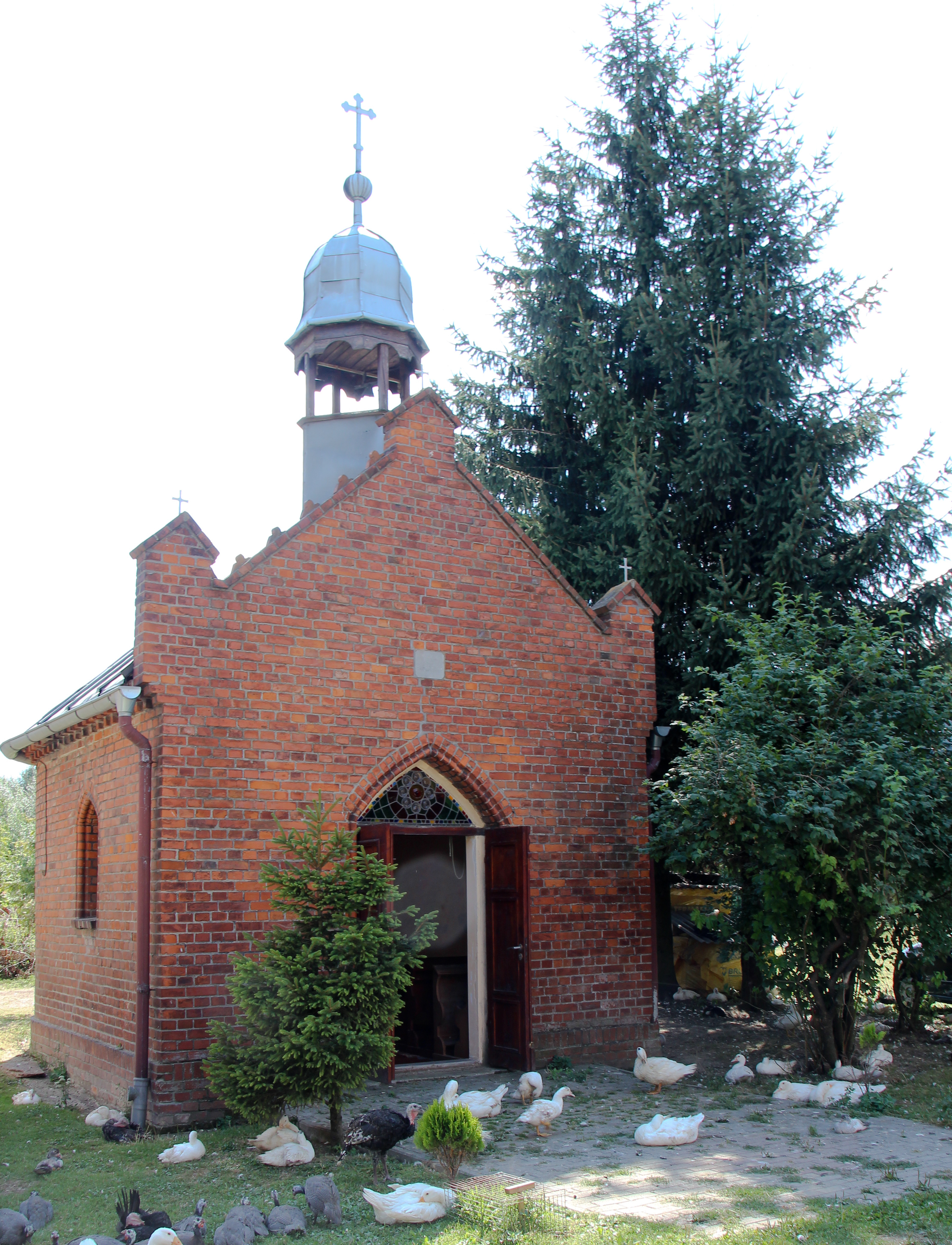 Szybowice – wieś w Polsce położona w województwie opolskim, w powiecie prudnickim, w gminie Prudnik.